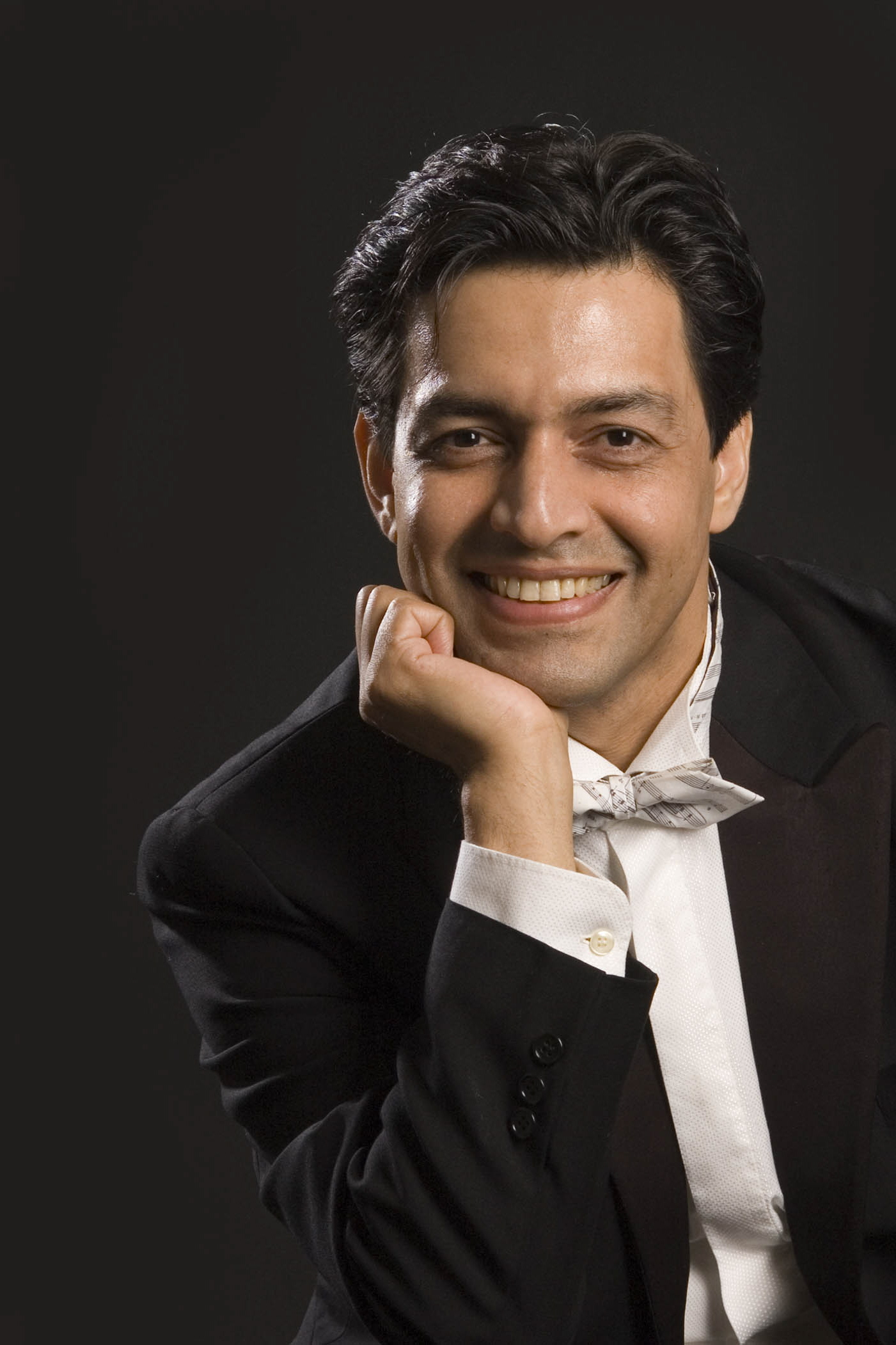 Porträtaufnahme